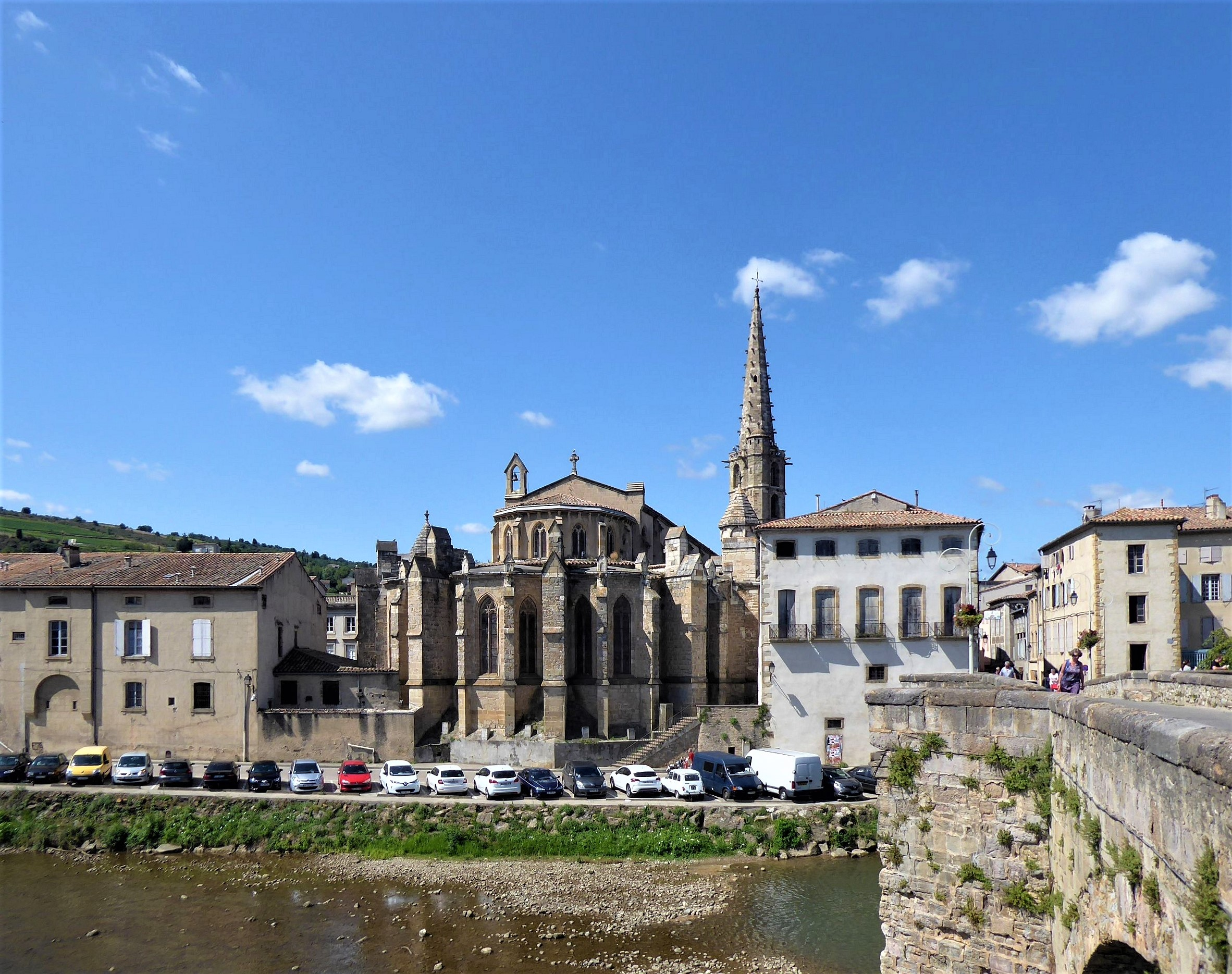 Eglise Saint-Martin de Limoux